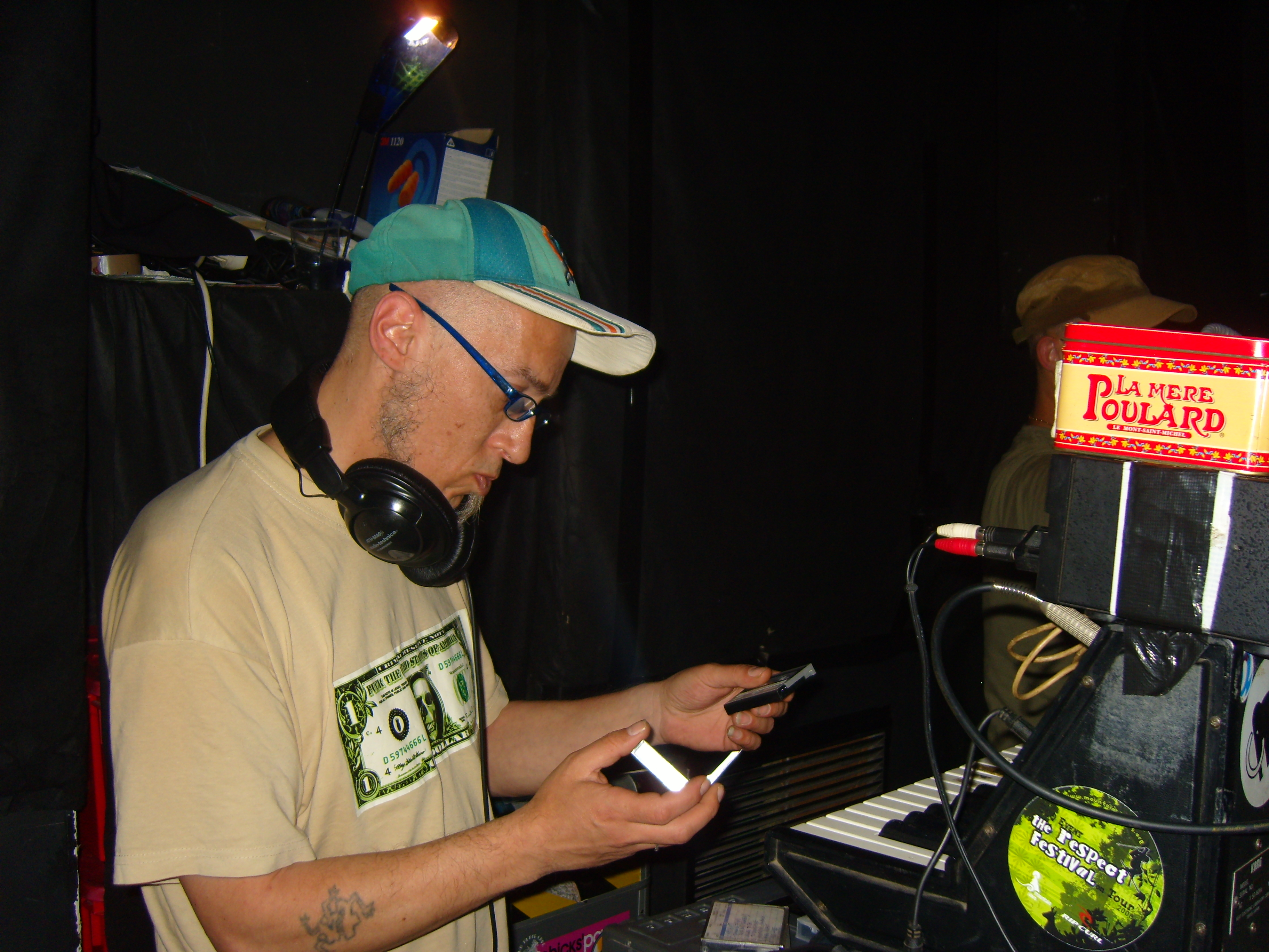 Junior Cony en live au Mistral Palace, Valence (26)